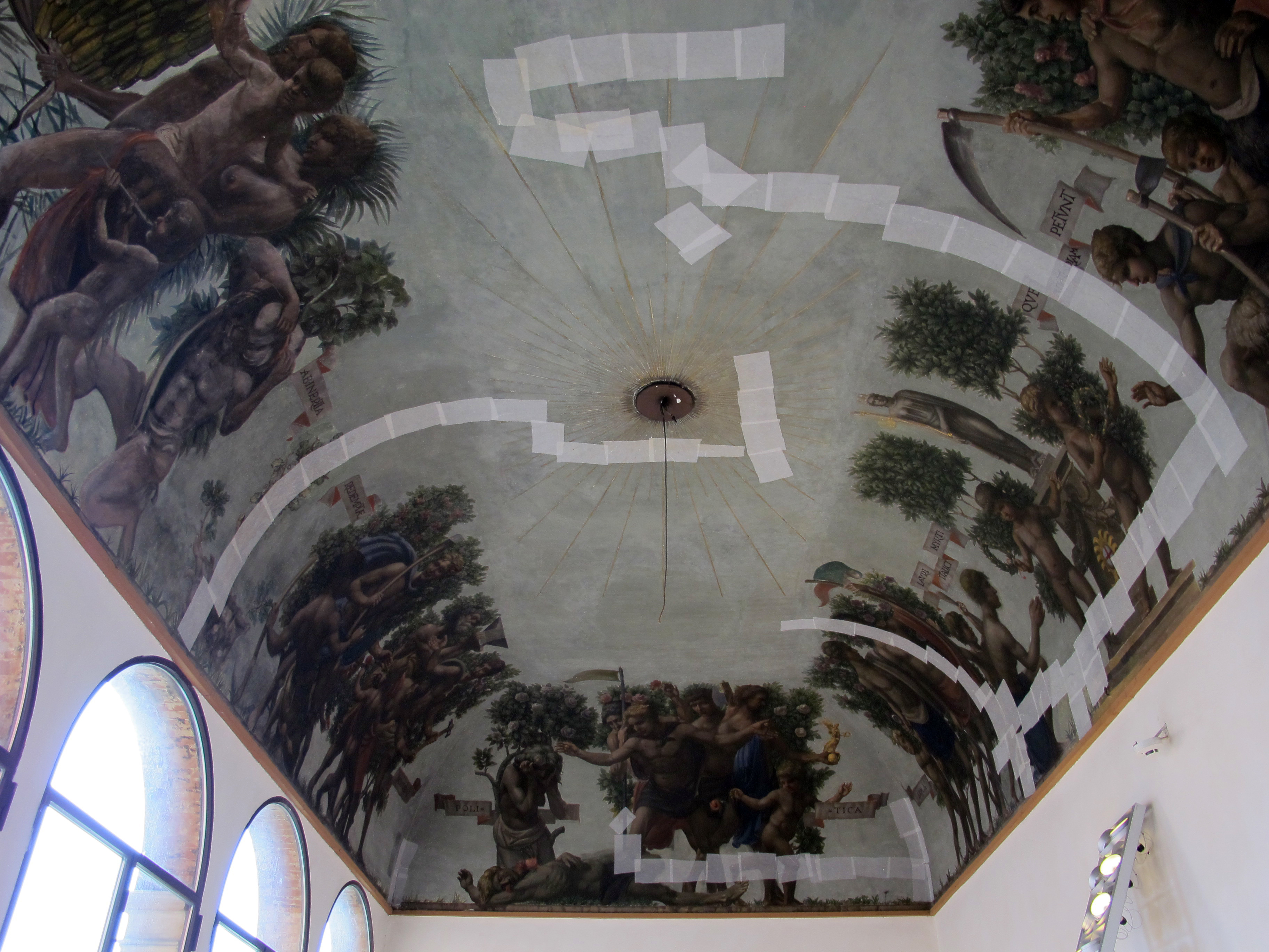 Castello Estense - MIBAC This is a photo of a monument which is part of cultural heritage of Italy.